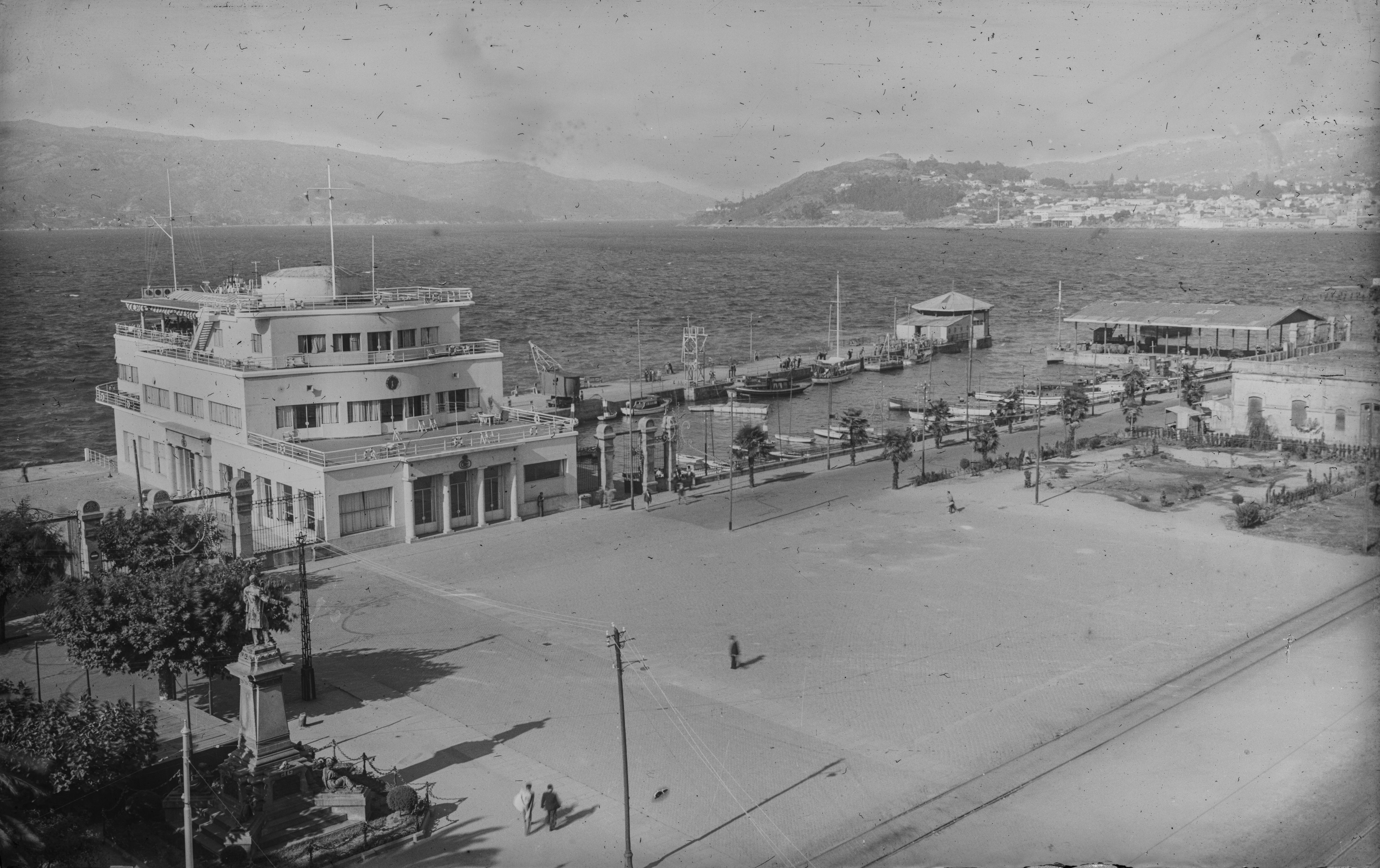 Fotografía antiga da zoa do RCNV (entre 1920 e 1940 da cidade de Vigo)